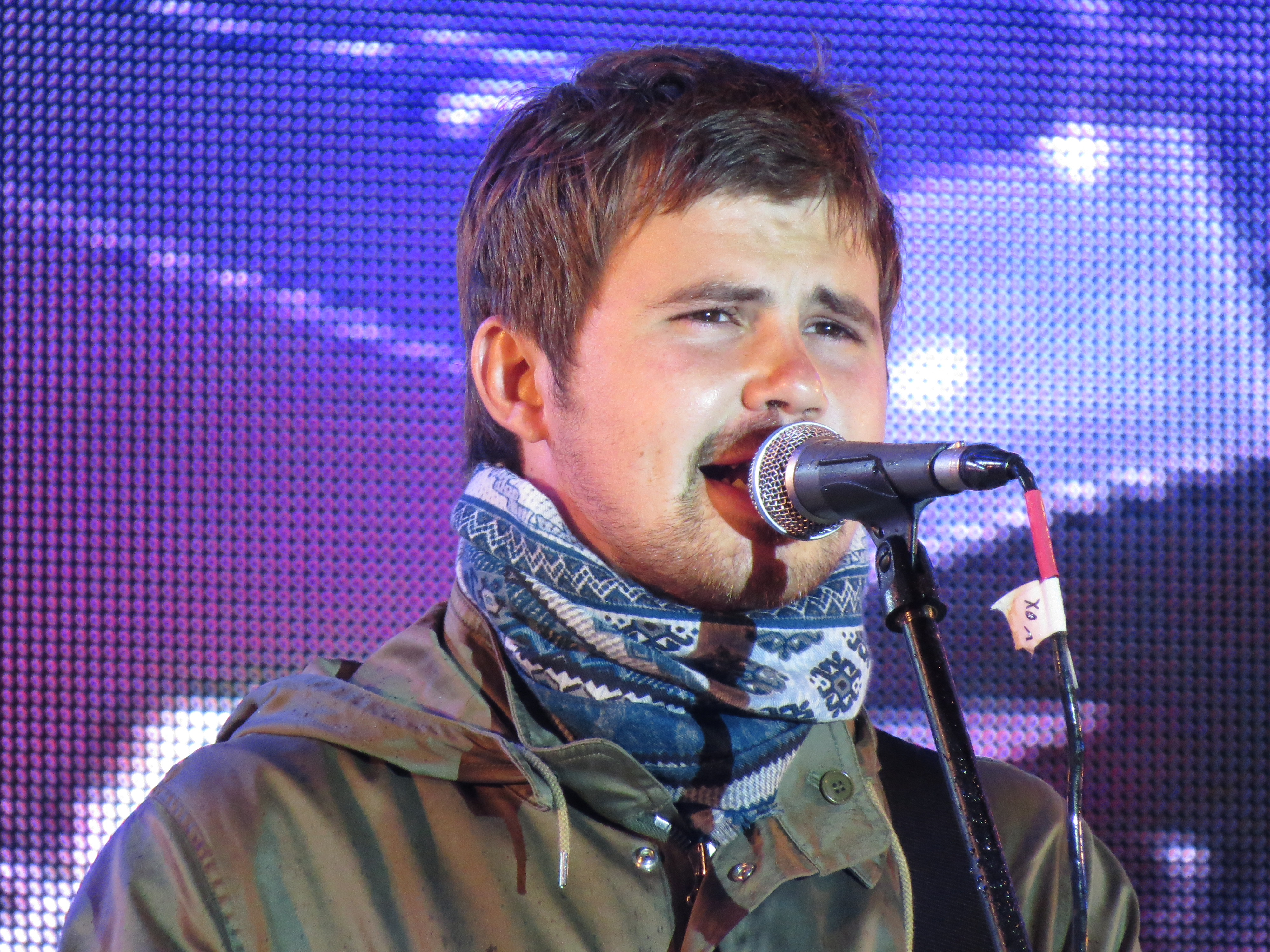 Вася Обломов на концерте-митинге в поддержку кандидата в мэры Москвы Алексея Навального на проспекте Сахарова 6 сентября 2013 года